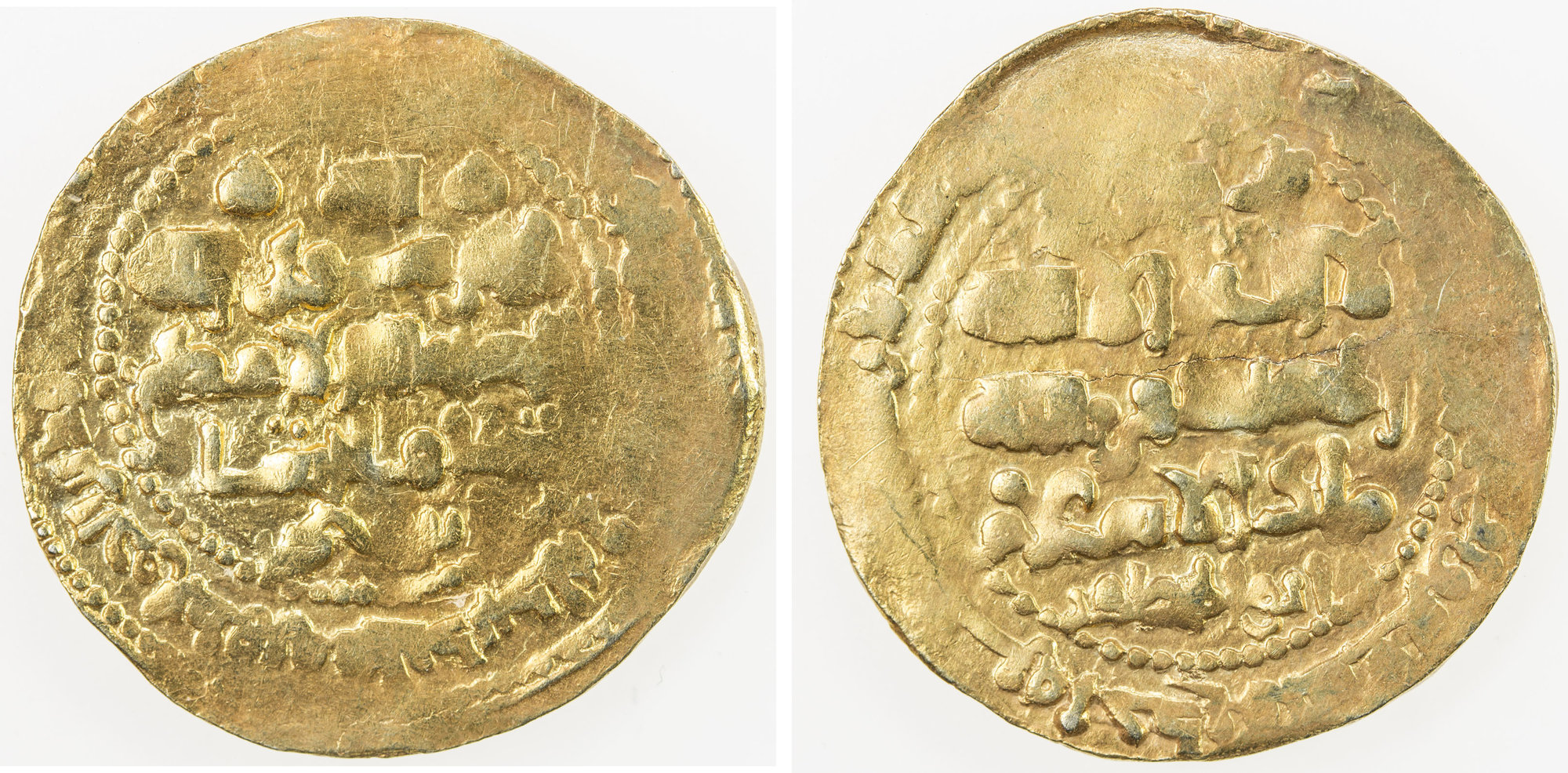 سکه یک دیناری ابراهیم غزنوی؛ با عنوان مخصوص شاهنشاه